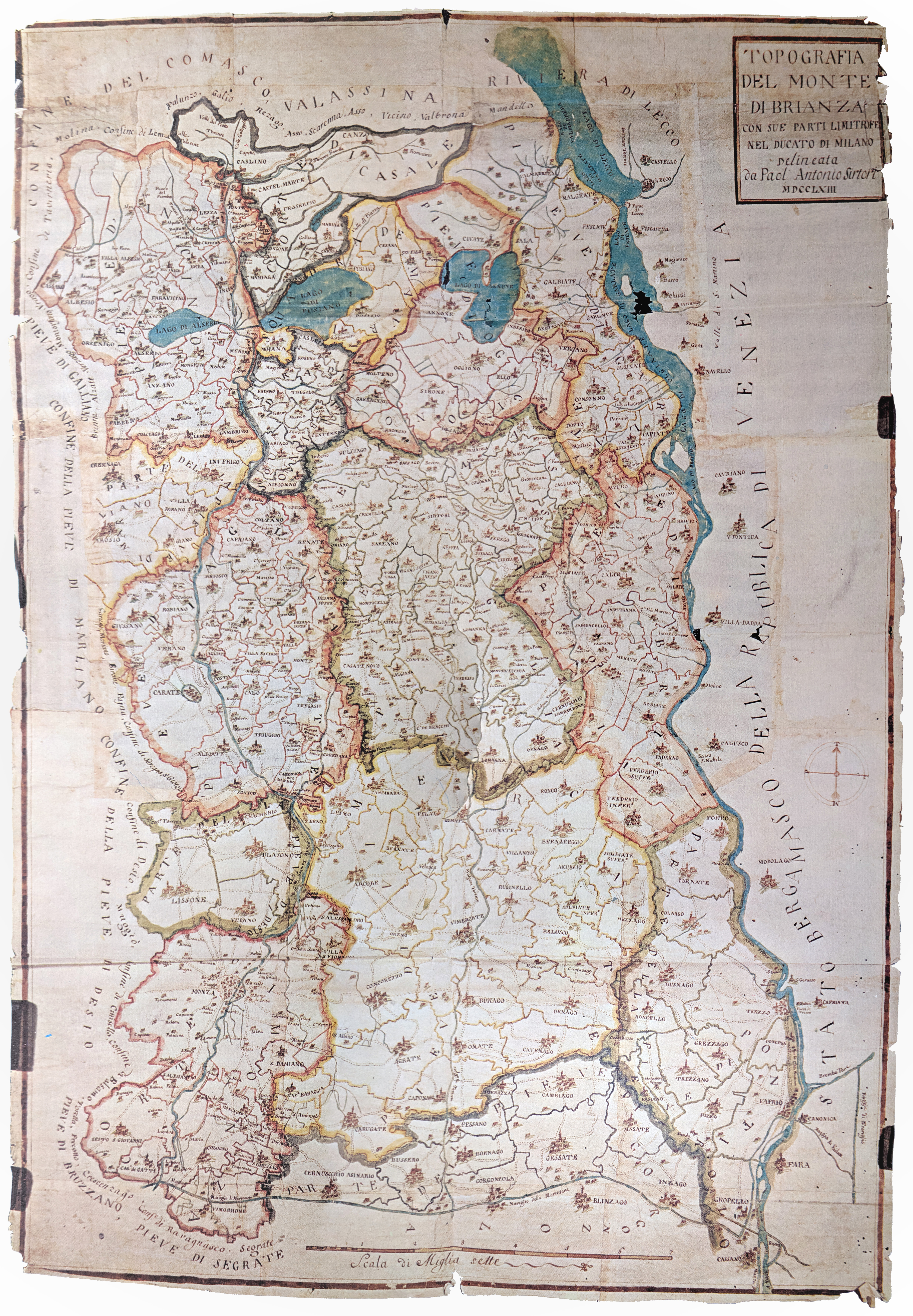 Mappa del Colle brianza di Paolo Antonio Sirtori, del 1763, raccolta Bertarelli Milano